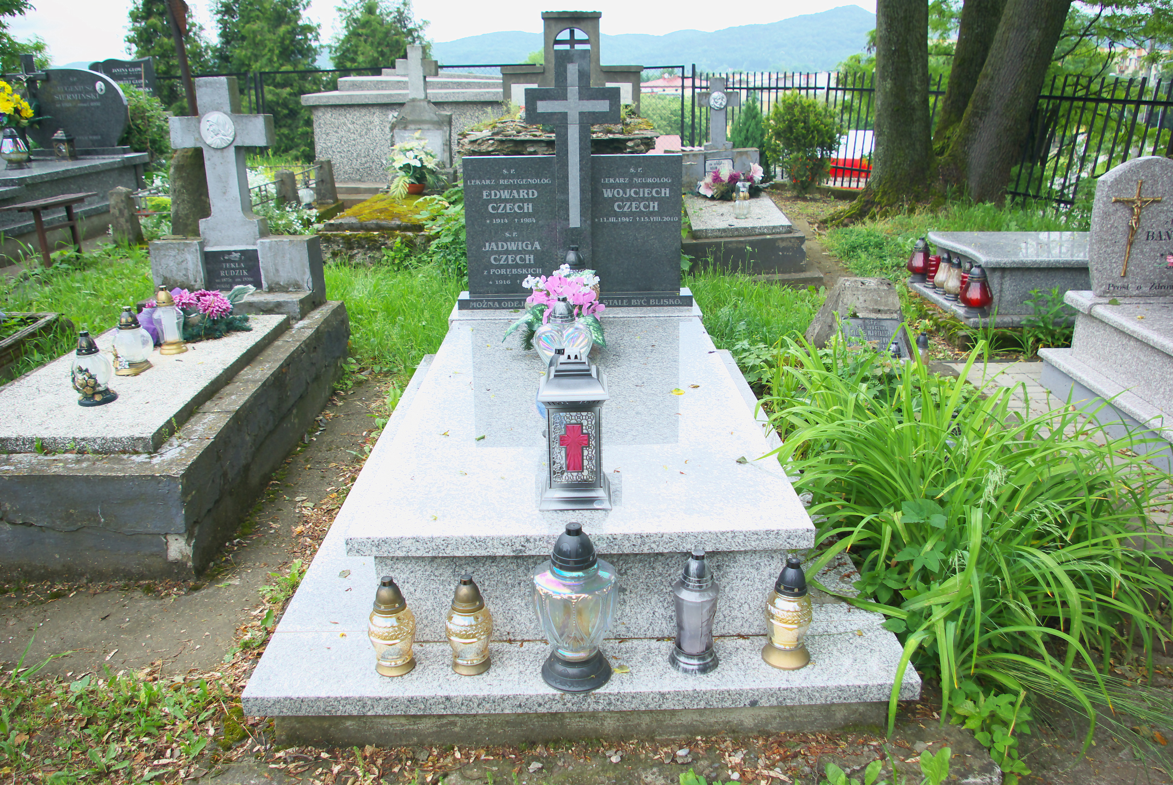 Grobowiec rodziny Czech w części "Matejki Stary" Cmentarza Centralnego w Sanoku.